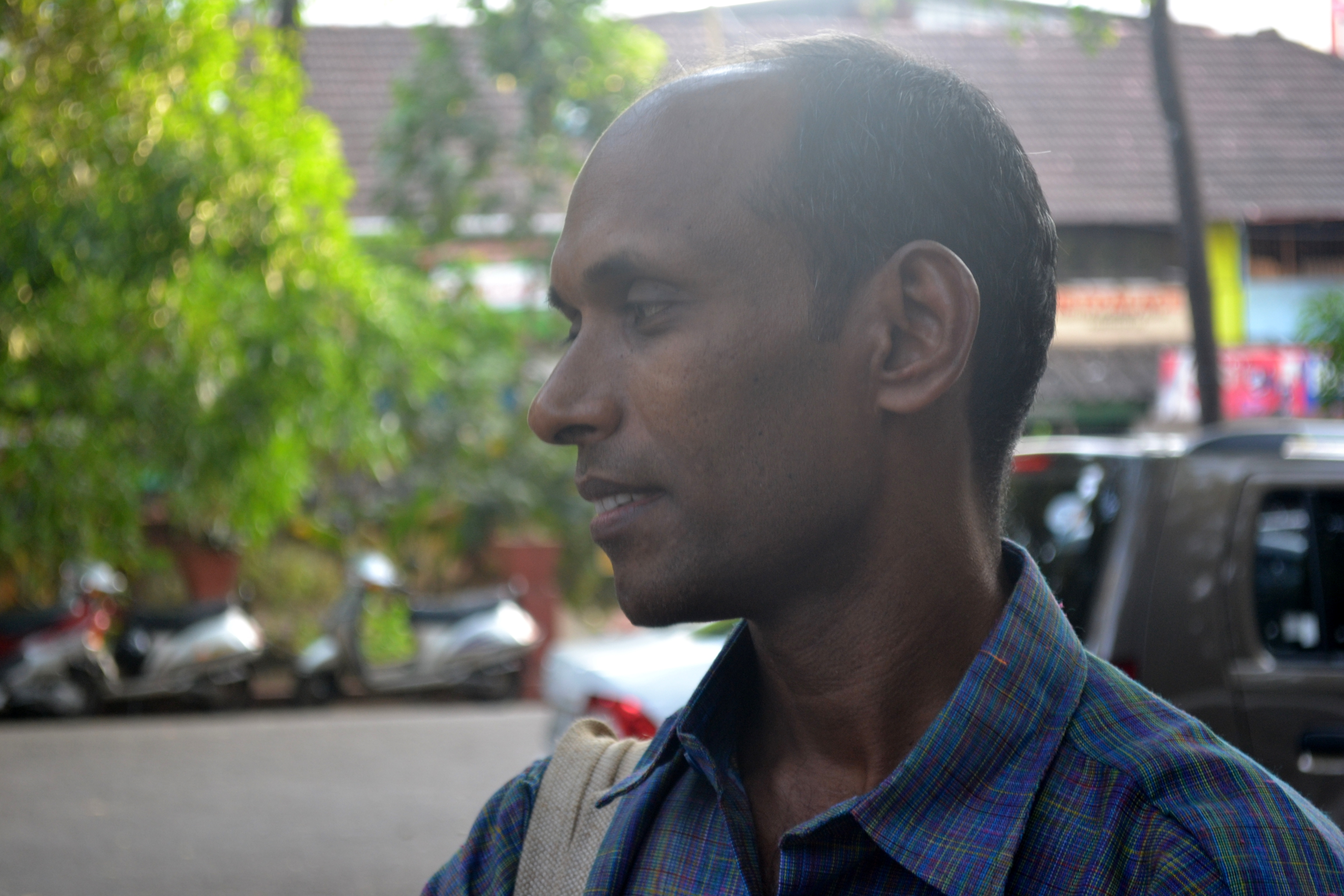 പ്ലാവ് ജയൻ